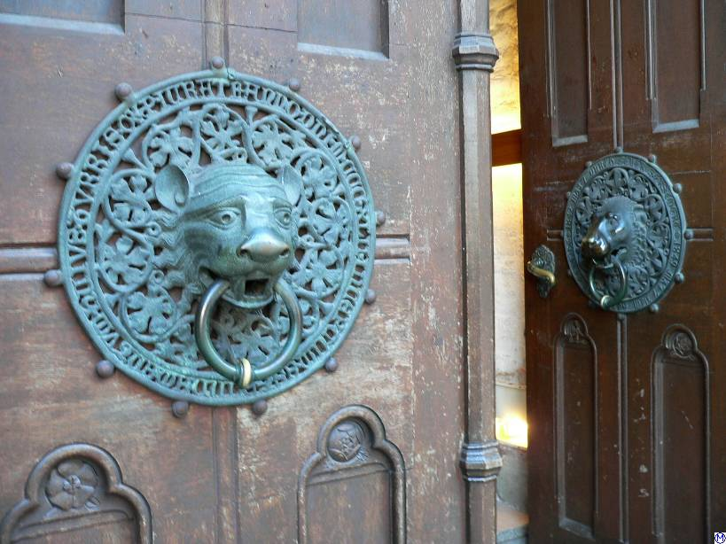 Gotischer Türgriff, Bronze, St.Petri HamburgThis is a photograph of an architectural monument.